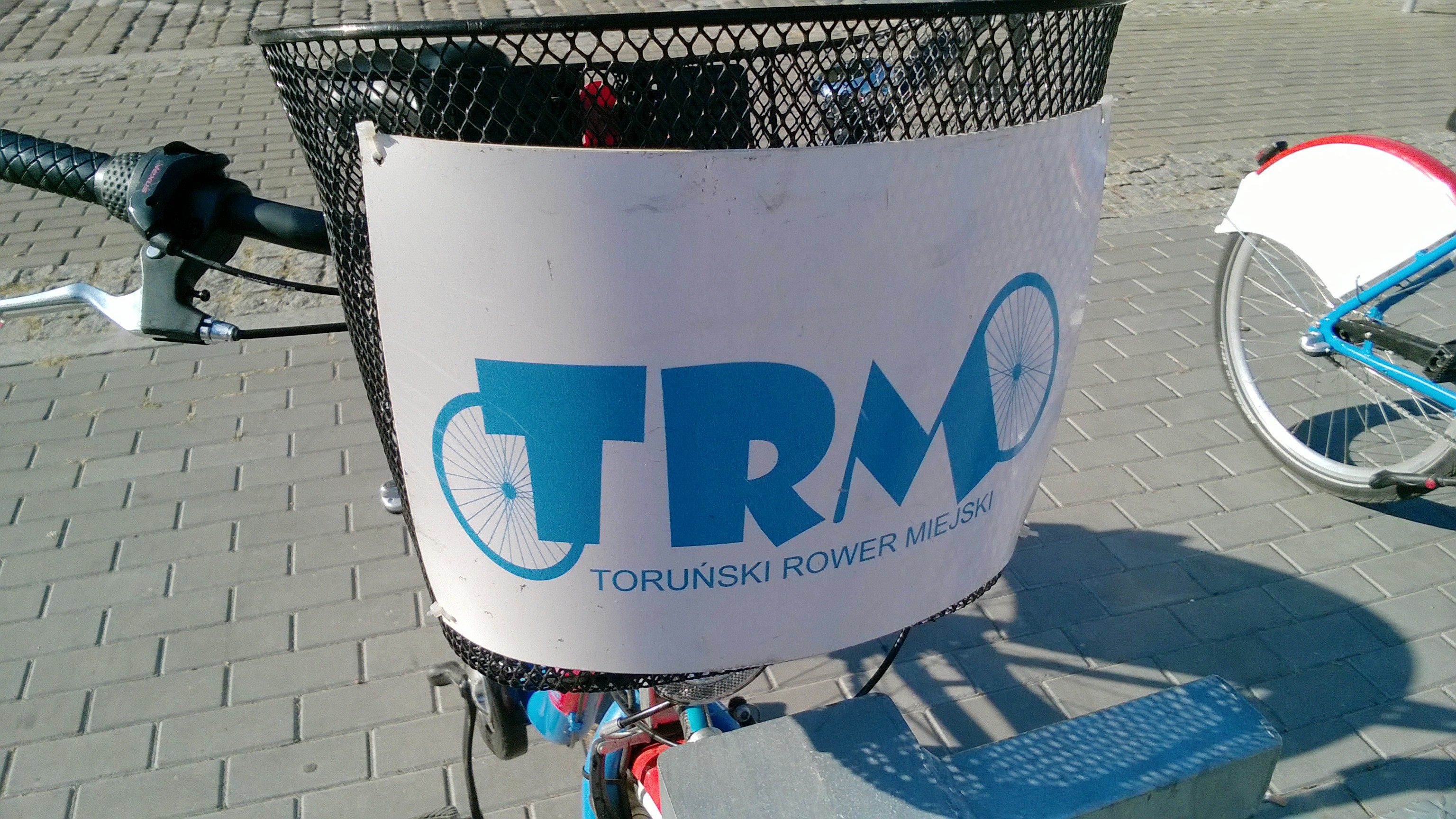 Toruński Rower Miejski5